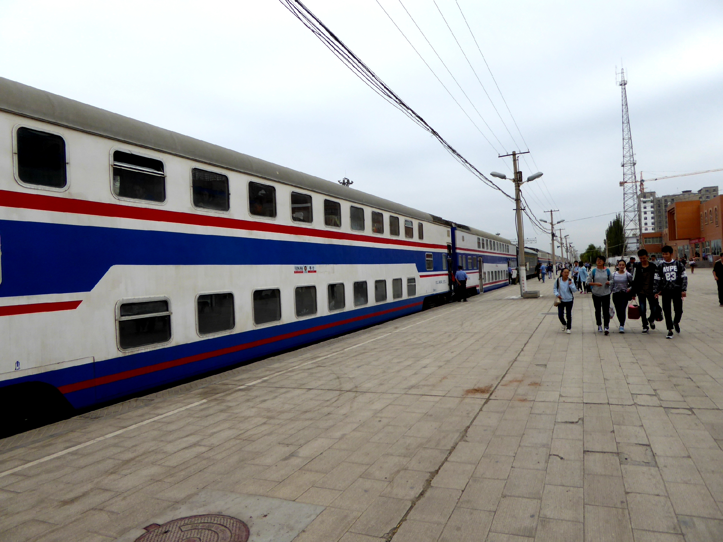 Railway Station Kashgar Xinjiang China 新疆 喀什 火车站